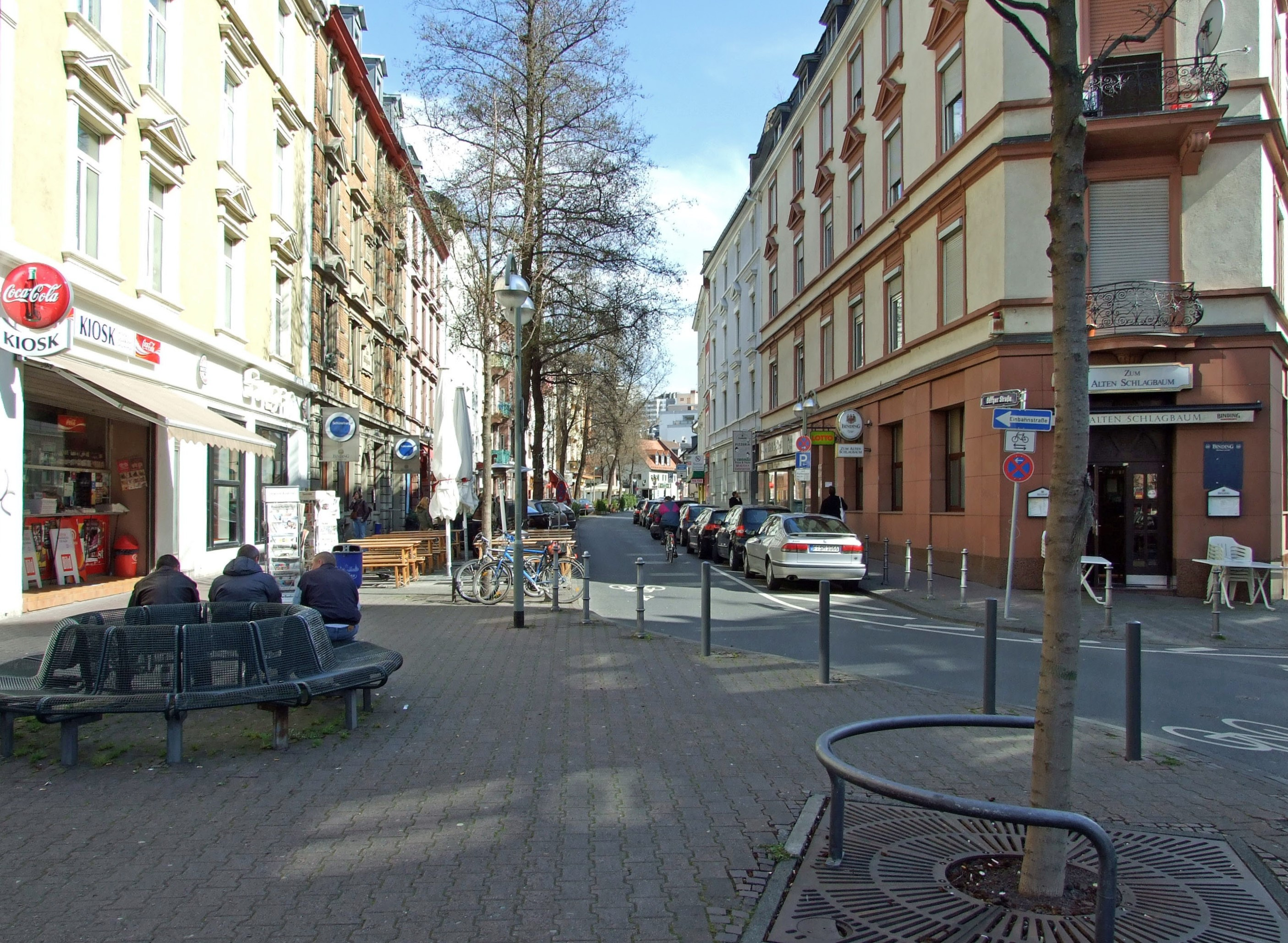 Berger Strasse hinter „Bornheimer Fuenffingerplaetzchen“ in Richtung Nord, Ffm-Bornheim